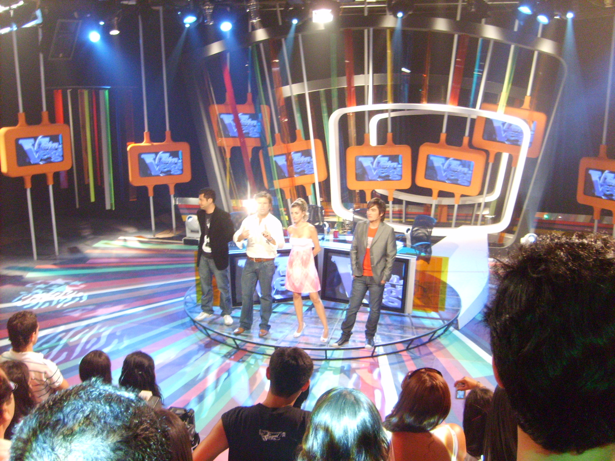 El estudio del programa de TV Sin vergüenza, emitido por Chilevisión. Al centro del escenario están Pedro Ruminot, Ignacio Gutiérrez, Catalina Palacios y Sergio Freire. Programa grabado el 9 de enero de 2008.